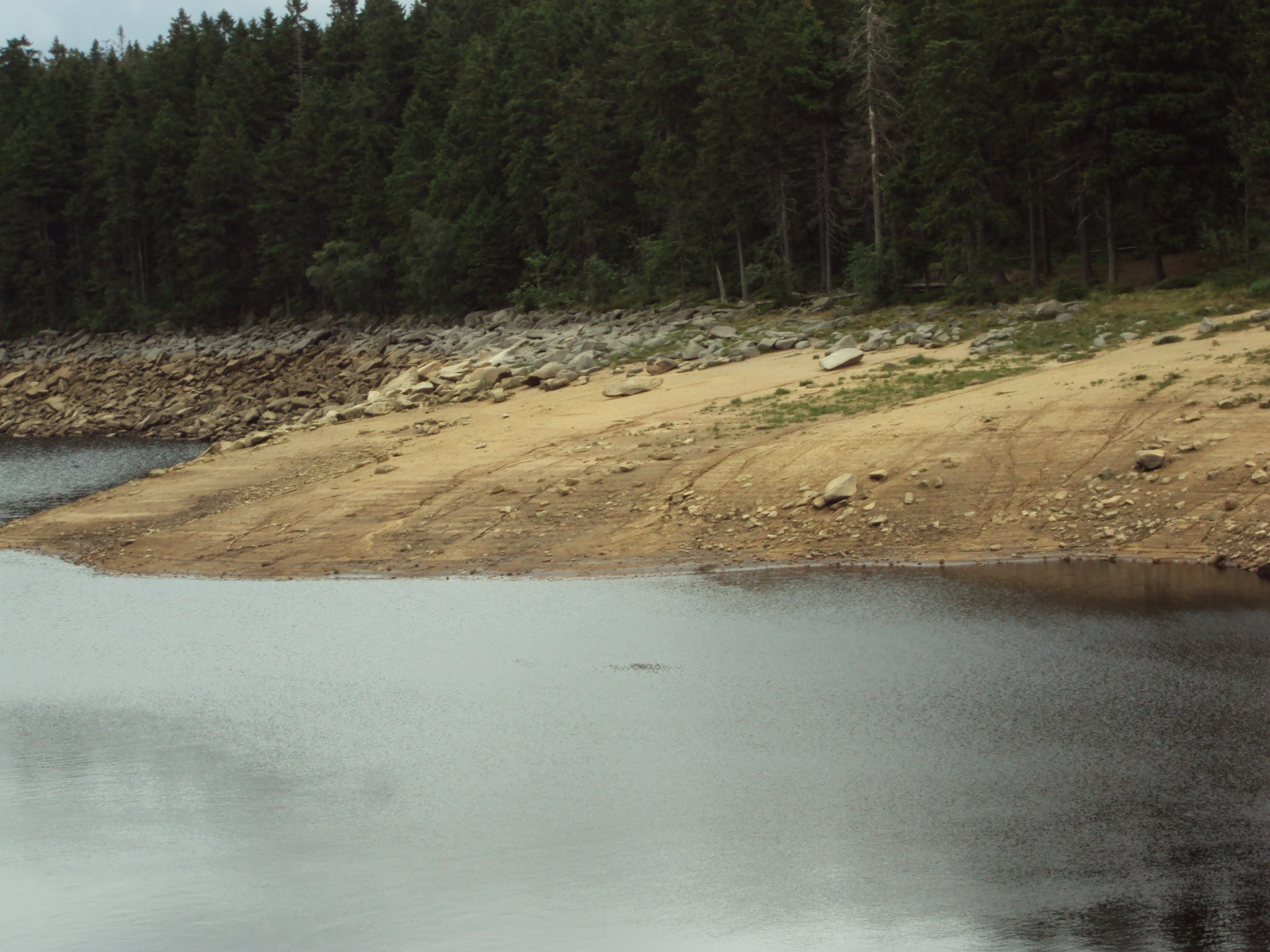 Ostufer des Oderteiches bei abgesenktem Wasserspiegel. Die großen Granitsteine, die im linken Bereich zu sehen sind, wurden in Dammnähe (rechter Bereich) alle entnommen, um sie als Baustoff für den Damm zu verwenden.